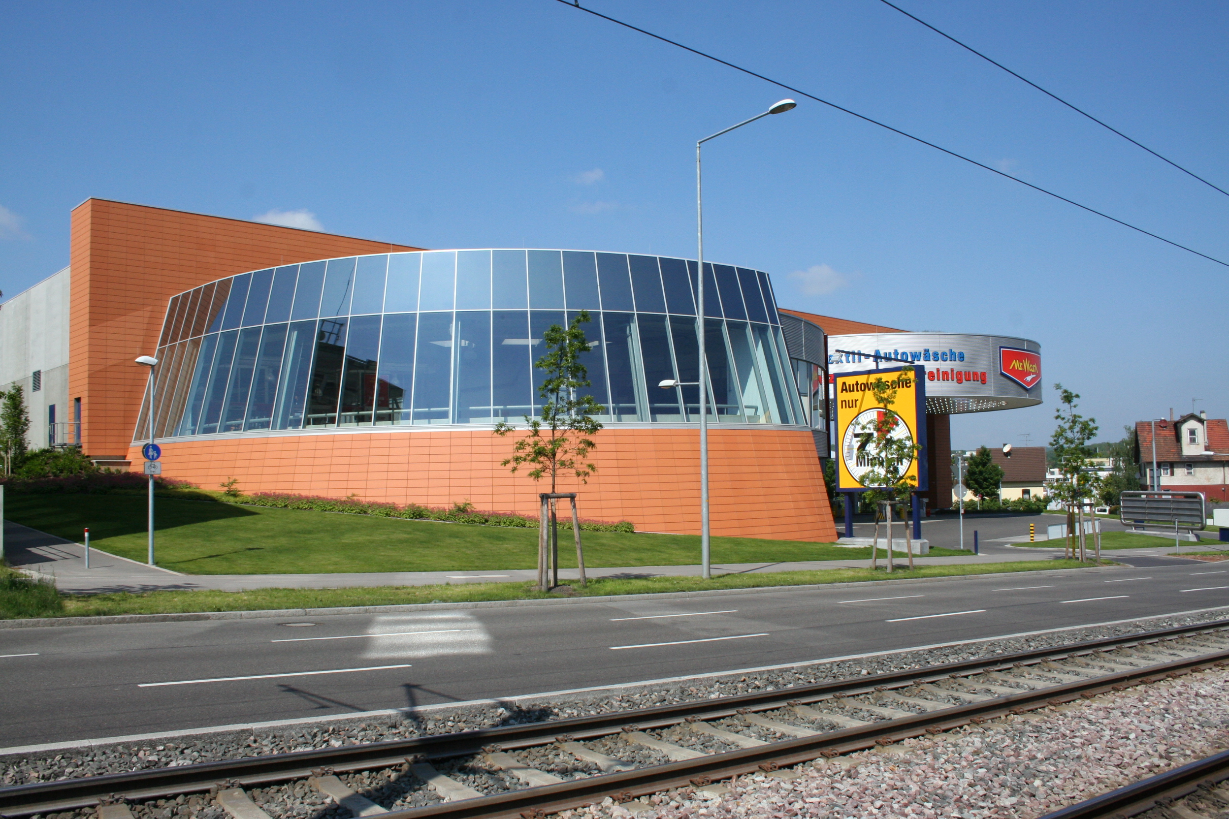 Mr. Wash Waschanlage und Tankstelle an der Heilbronner Strasse in Stuttgart